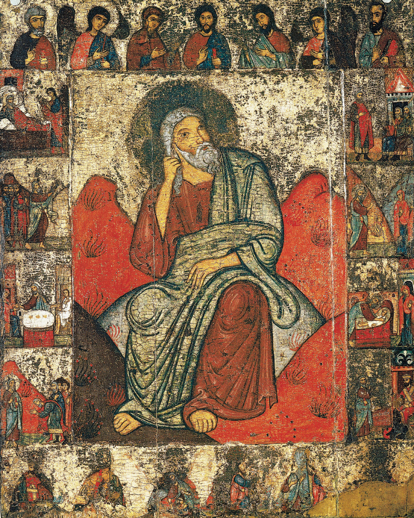 Russian icon of prophet Elijah. Илия пророк с житием и деисусом. Икона из церкви Ильи Пророка в погосте Выбуты, близ Пскова